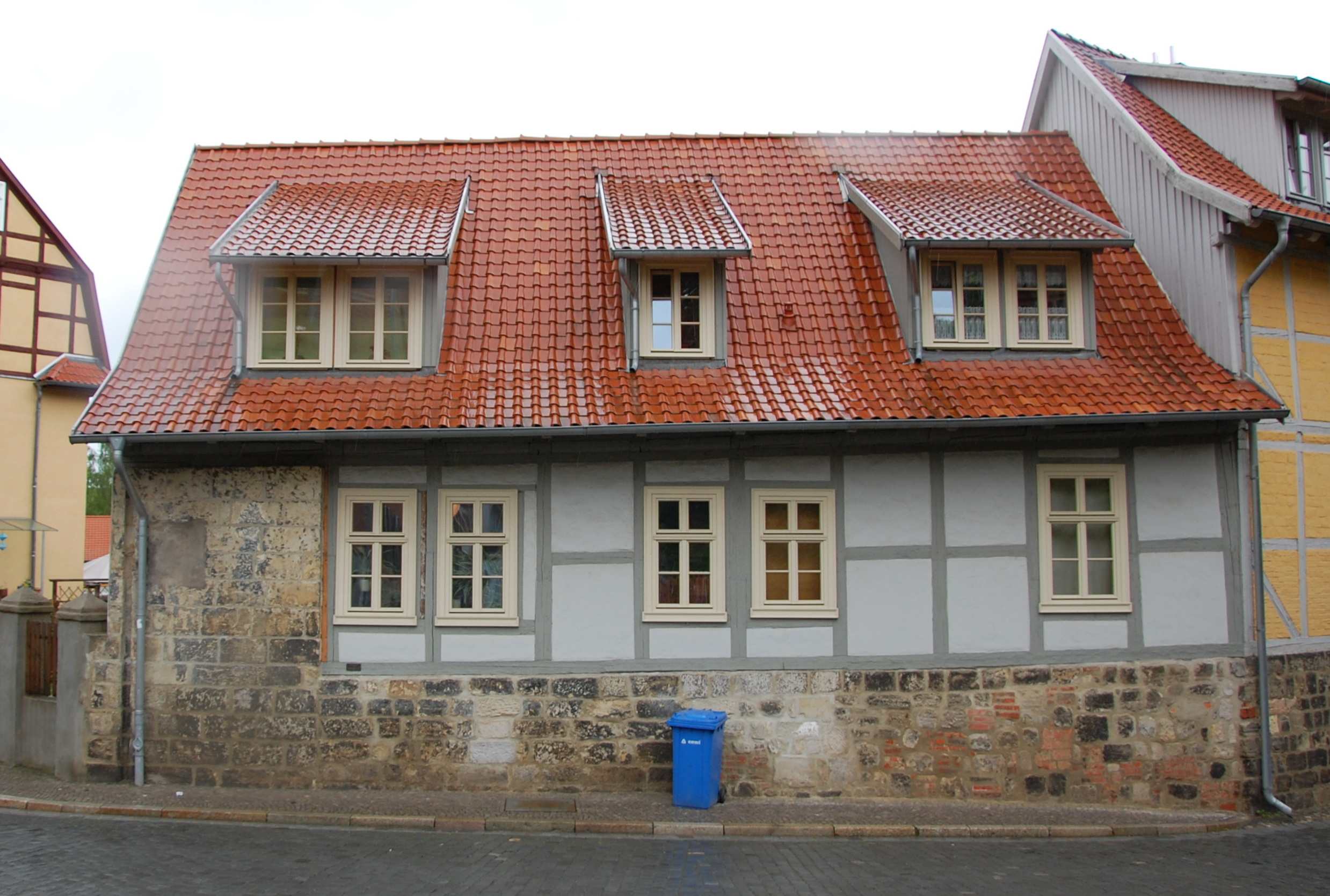 Haus Lange Gasse 14 in Quedlinburg